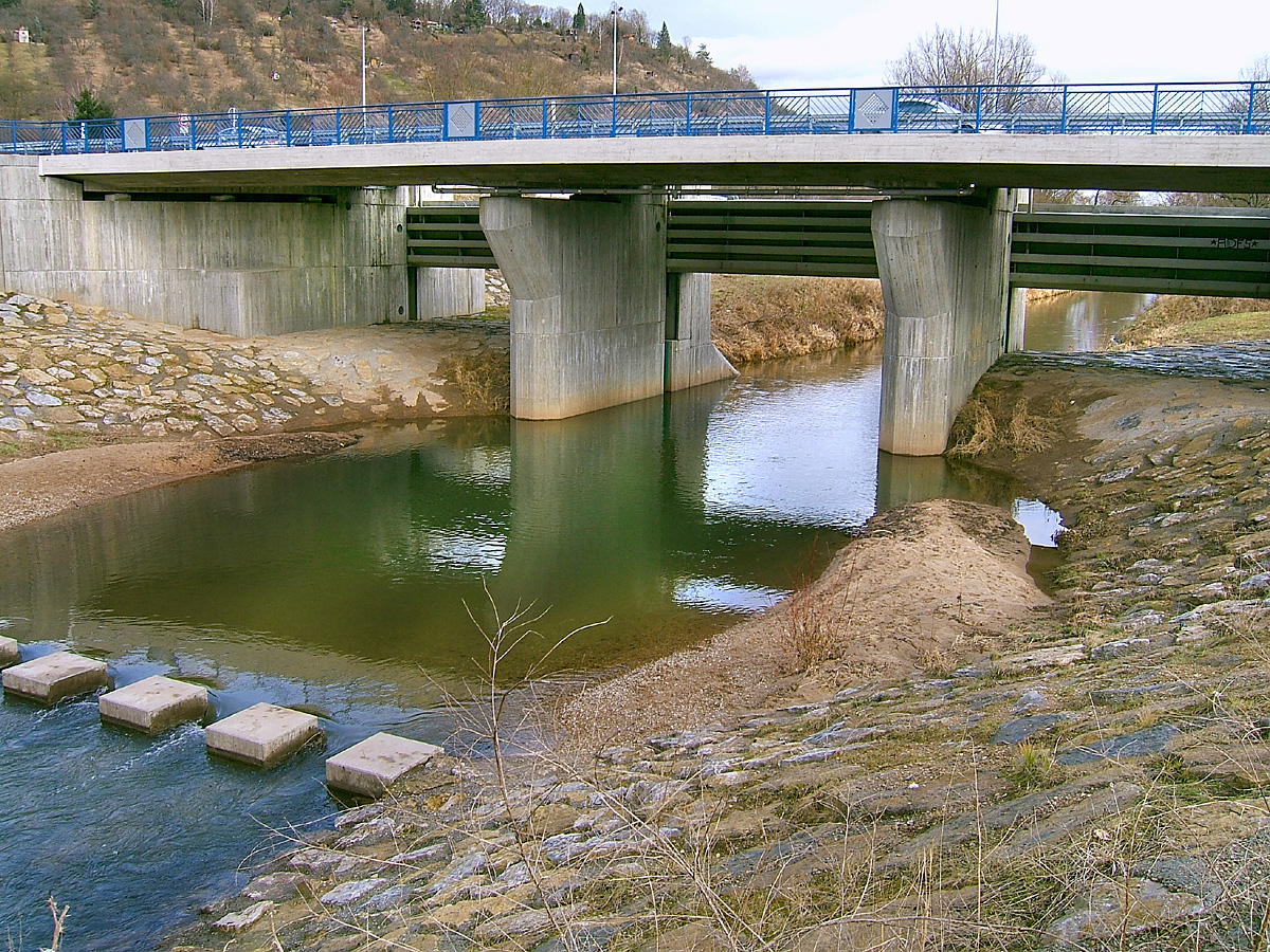 Brücke über die Rems beim Hochwasserrückhaltebecken Schorndorf-Winterbach, Baden-Württemberg, Deutschland